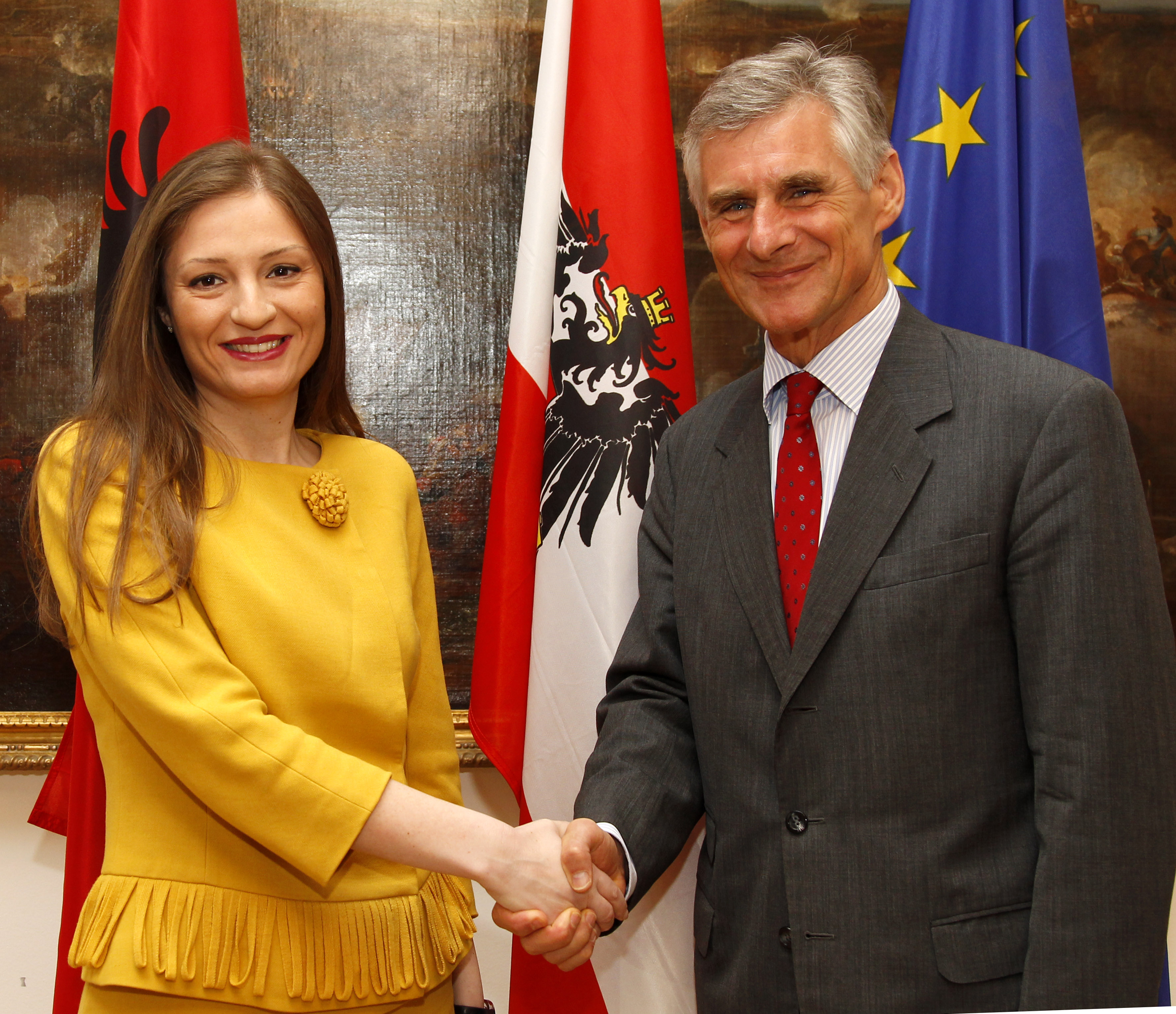 Dienstag, den 29. April 2014 traf Generalsekretär Michael Linhart (R) im Außenministerium in Wien mit der albanischen EU-Integrationsministerin Klajda Gjosha (L) zu einem Arbeitsgespräch zusammen. Foto: Mahmoud